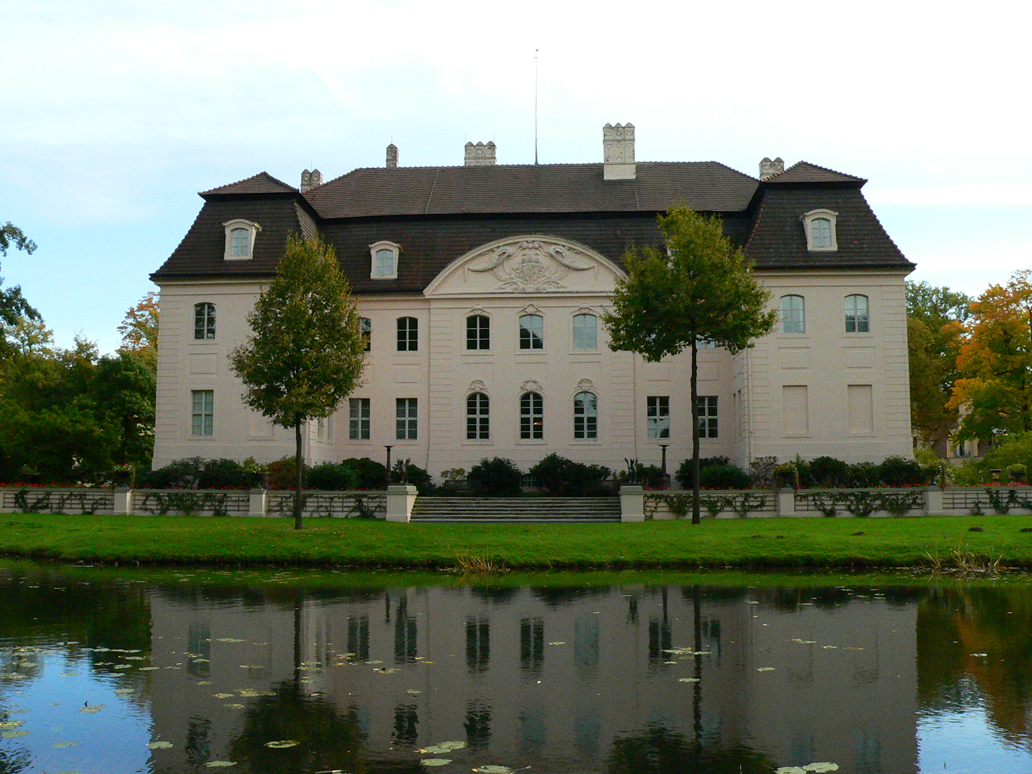 Cottbus - Schloss Branitz